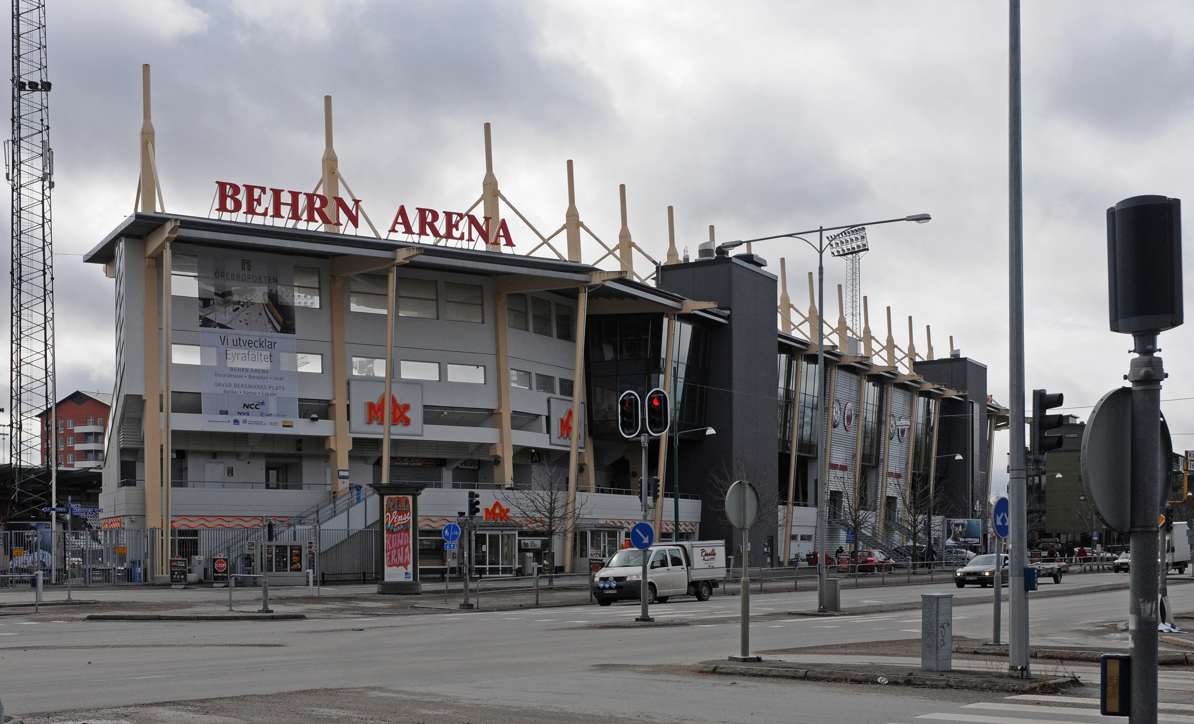 Behr arena i Örebro